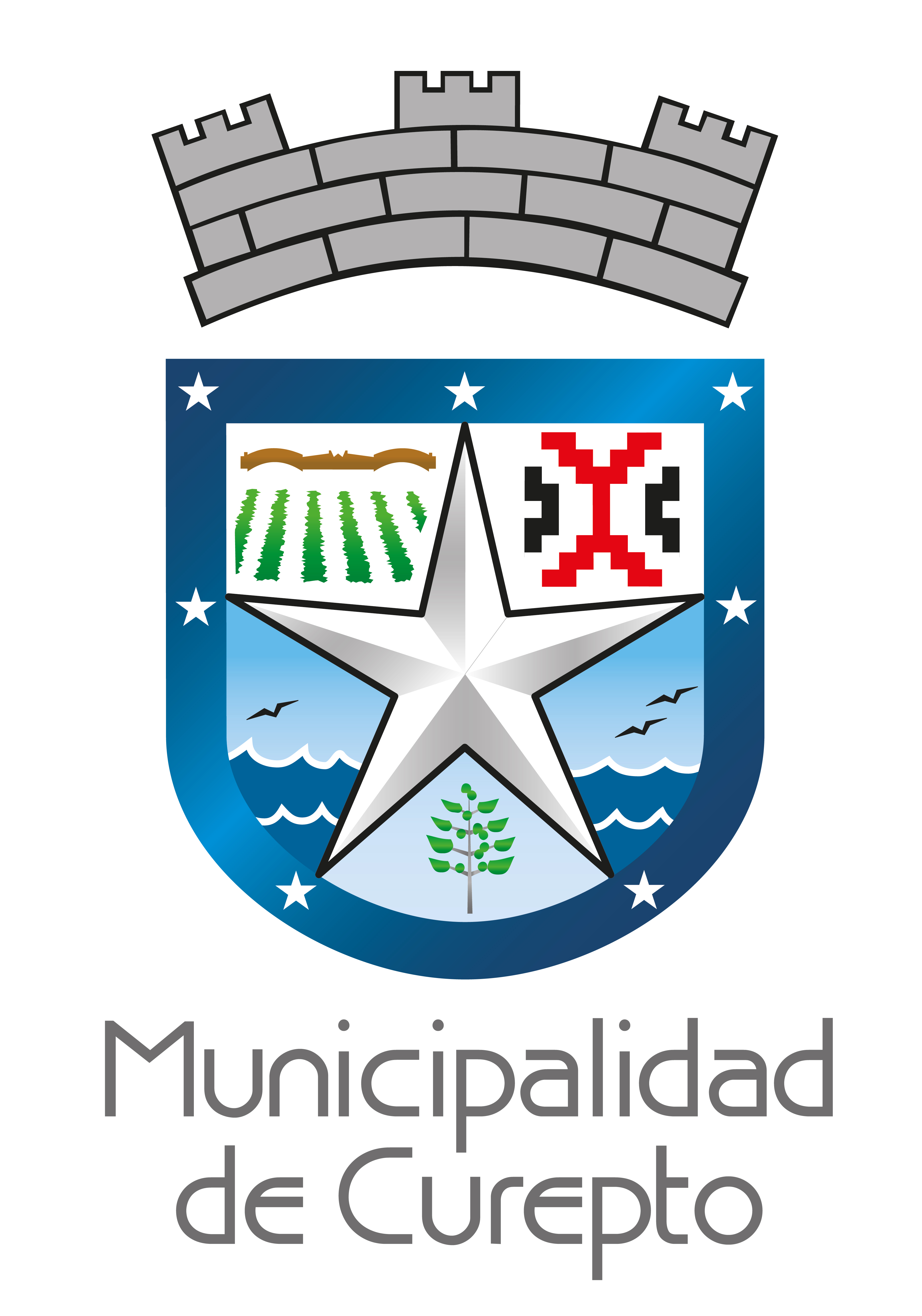 escudo de curepto, version 2014, patrimonio libre